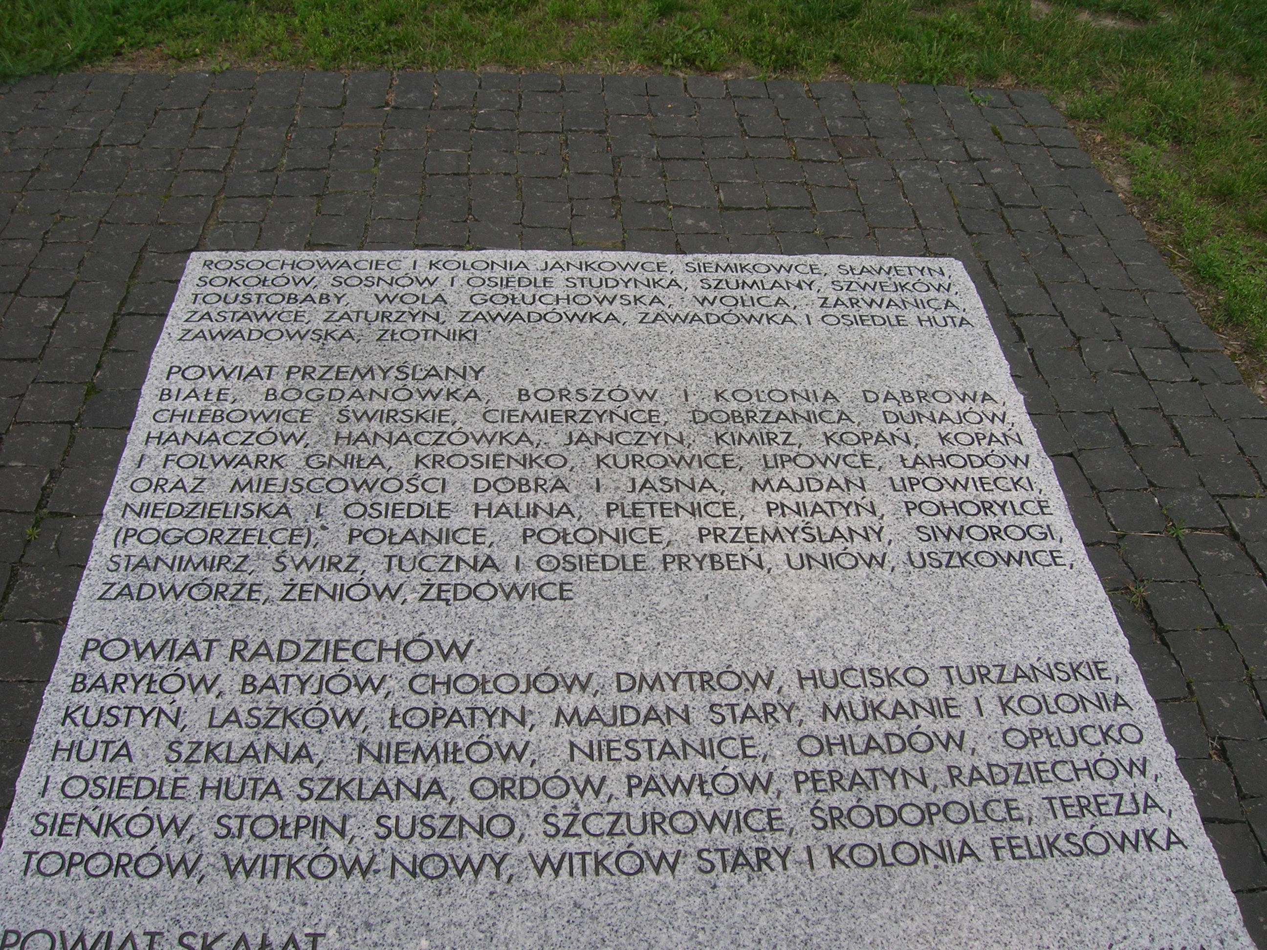 tablica powiaty Podhajce, Przemyślany i Radziechów